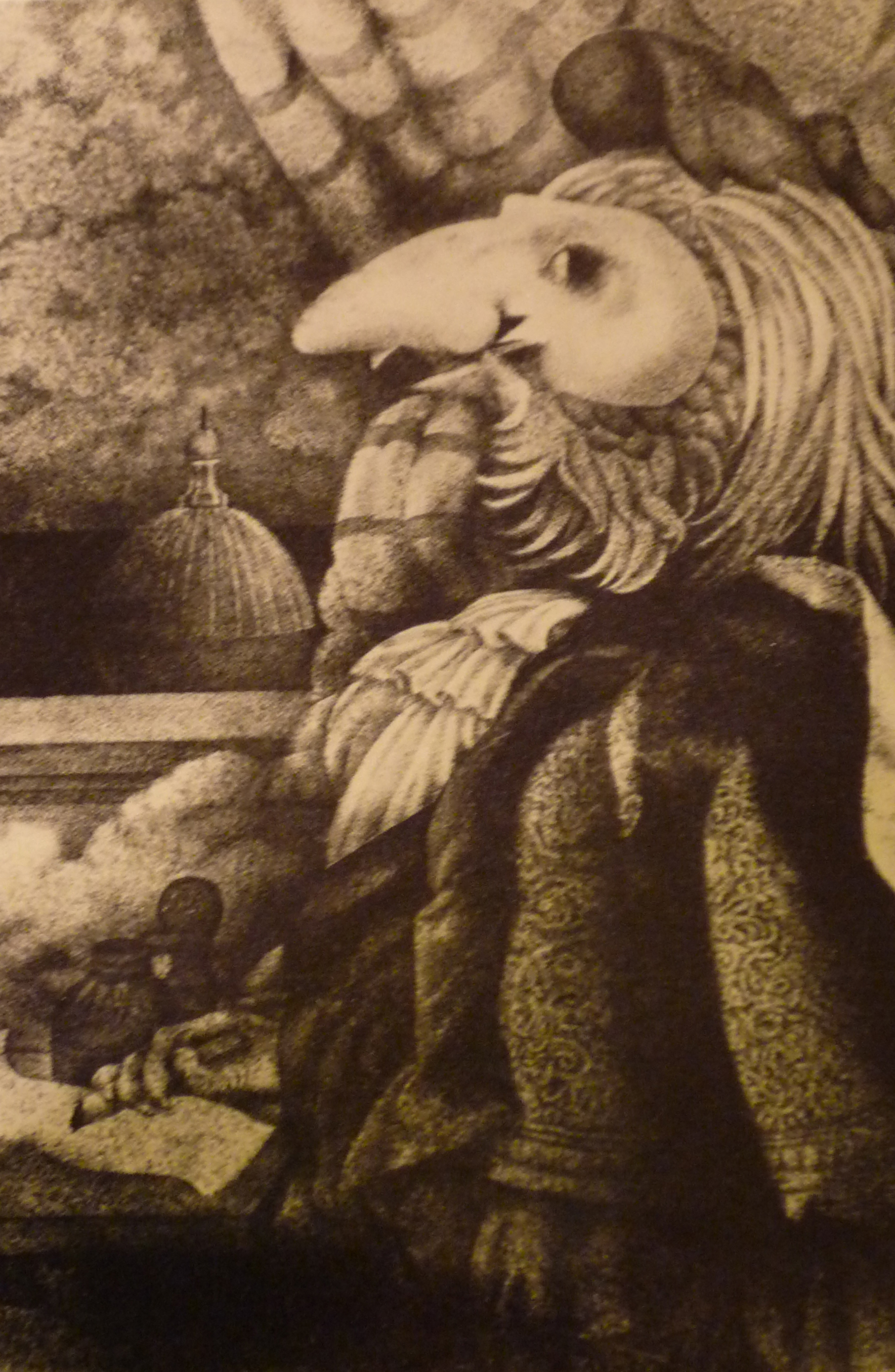 quadro